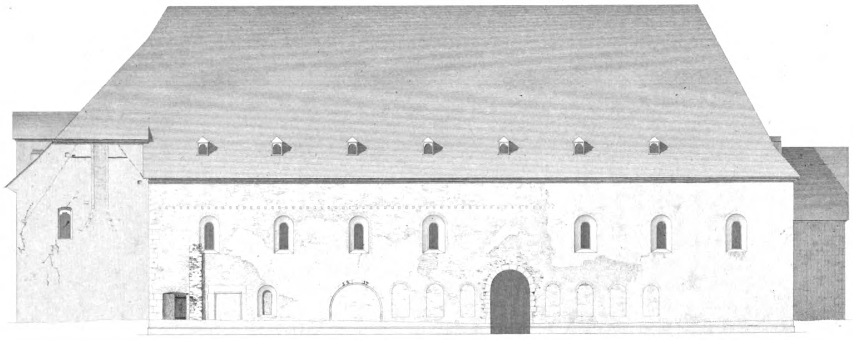 Seitenansicht des alten Hospital des Klosters Eberbach, Rheingau, Deutschland